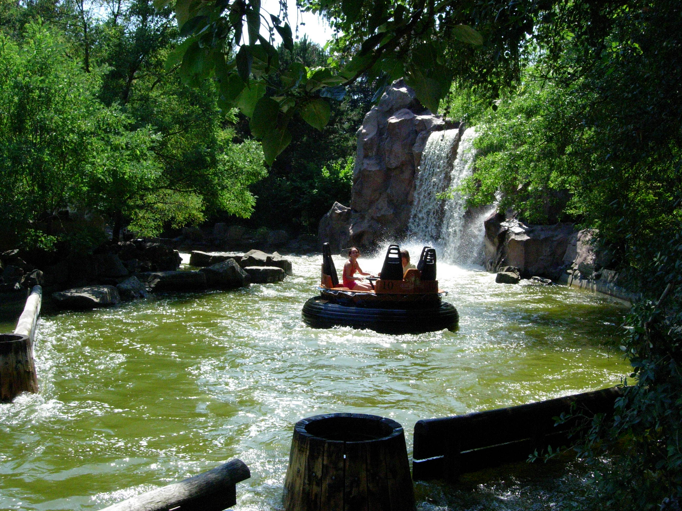 Piraña